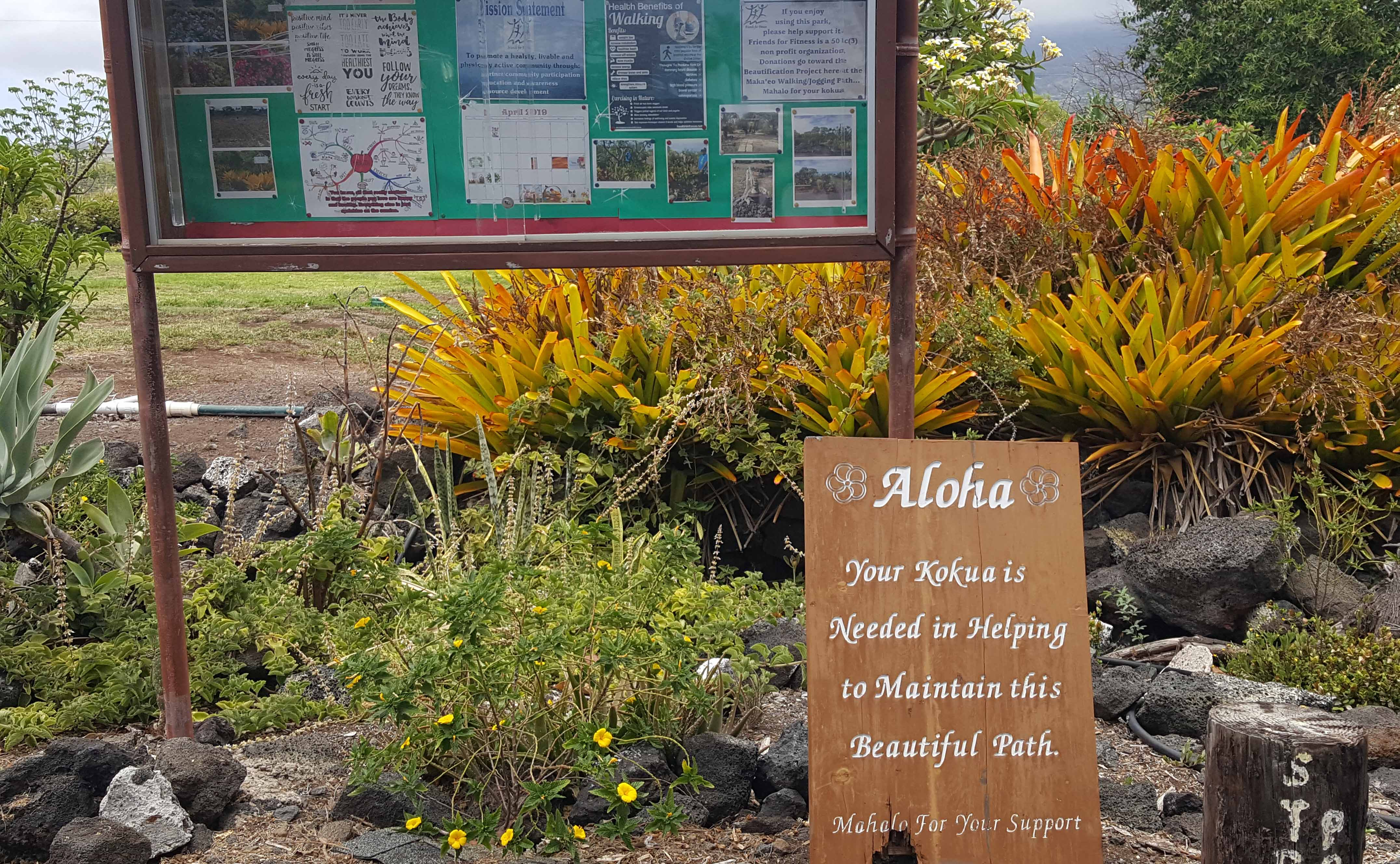 An English signboard including Hawaiian words, Aloha (Hello) and Kokua (Cooperation) along the Maka'eo Walking/Jogging Path, at Old Kona Airport State Recreation Area, Kailua Kona, Hawaii, USA